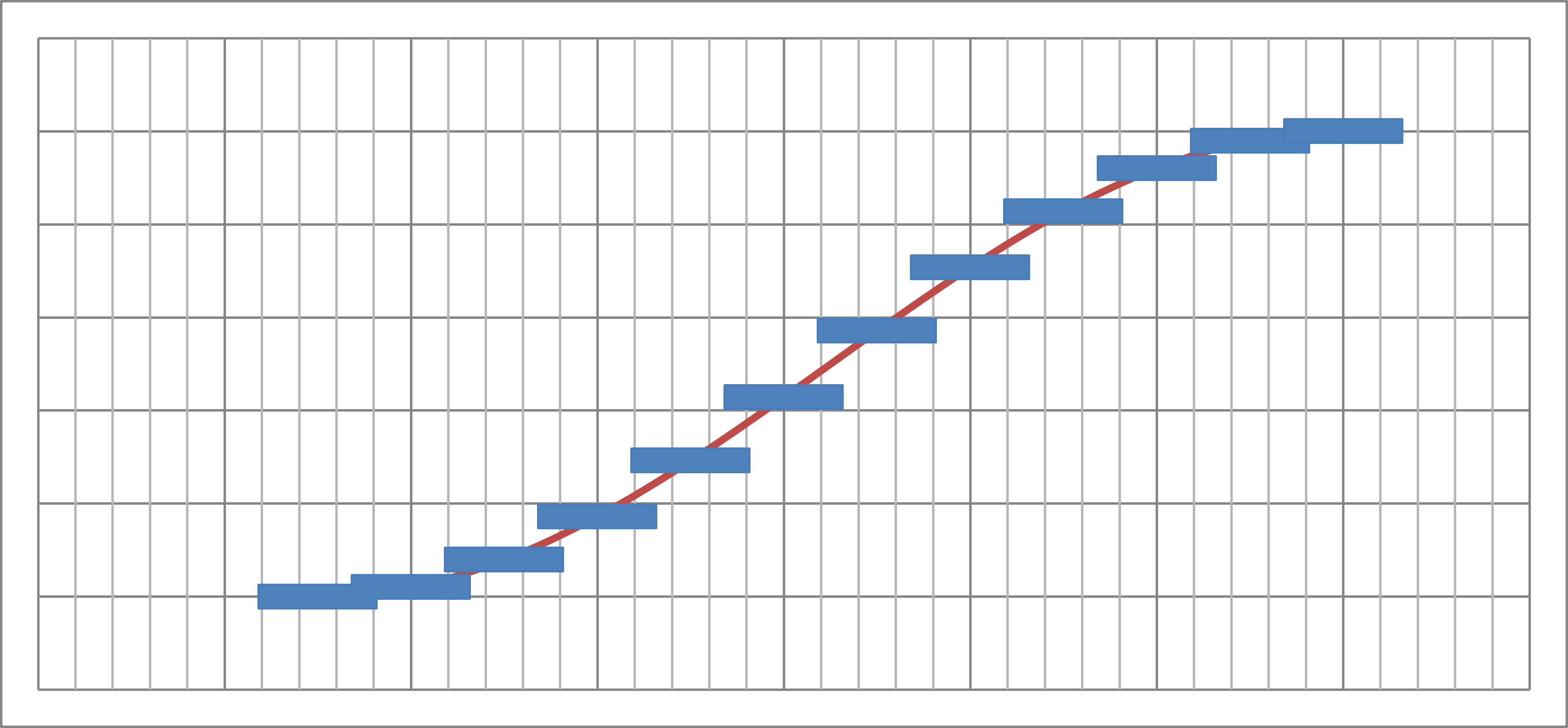 Prinzipszizze der Laurin-Treppe